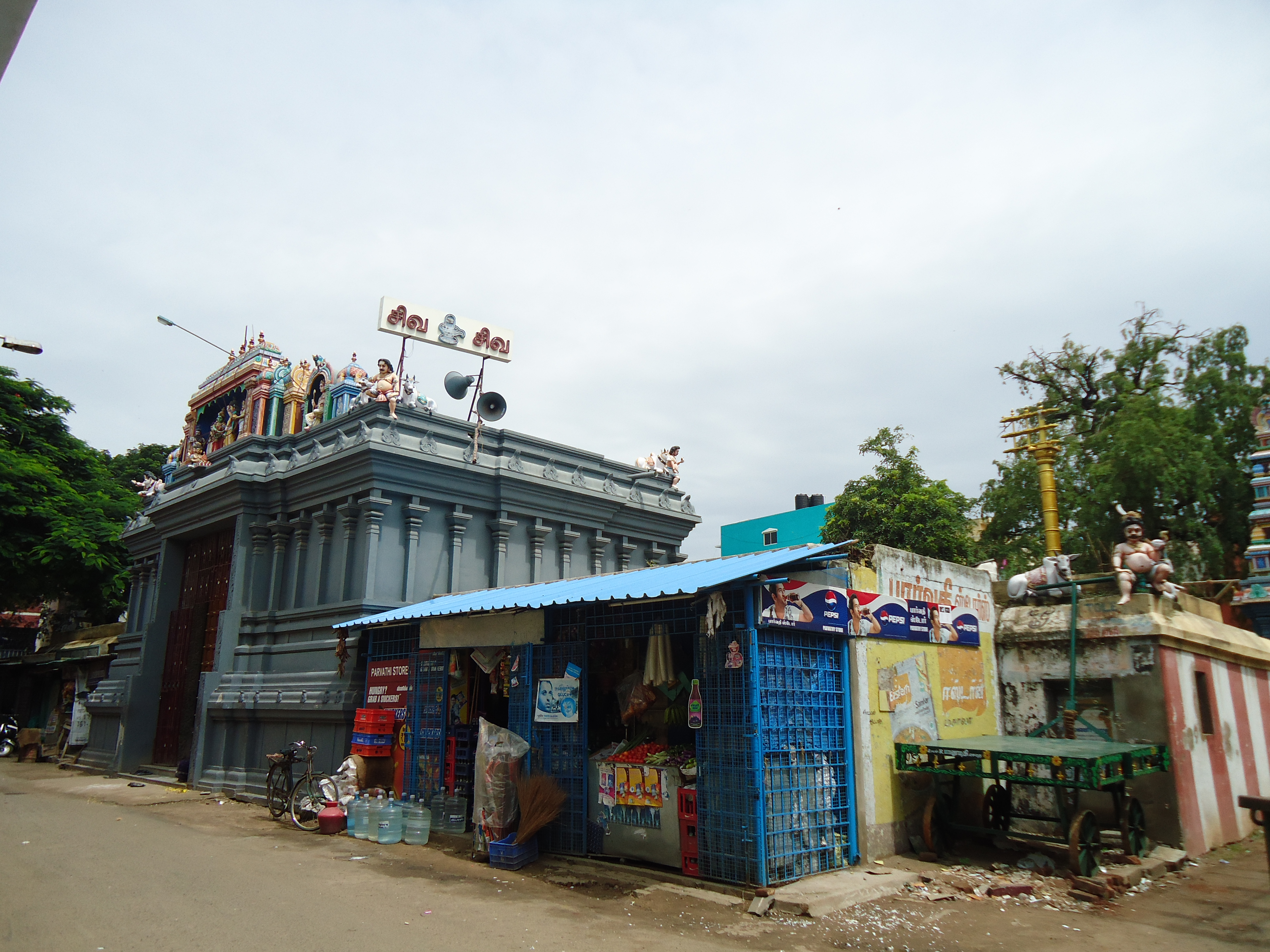 சைதாப்பேட்டை சௌந்தரேசுவரர் கோவில்